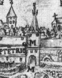 Burgtor Stadtfeste Dortmund, um 1610 Detmar Mulher